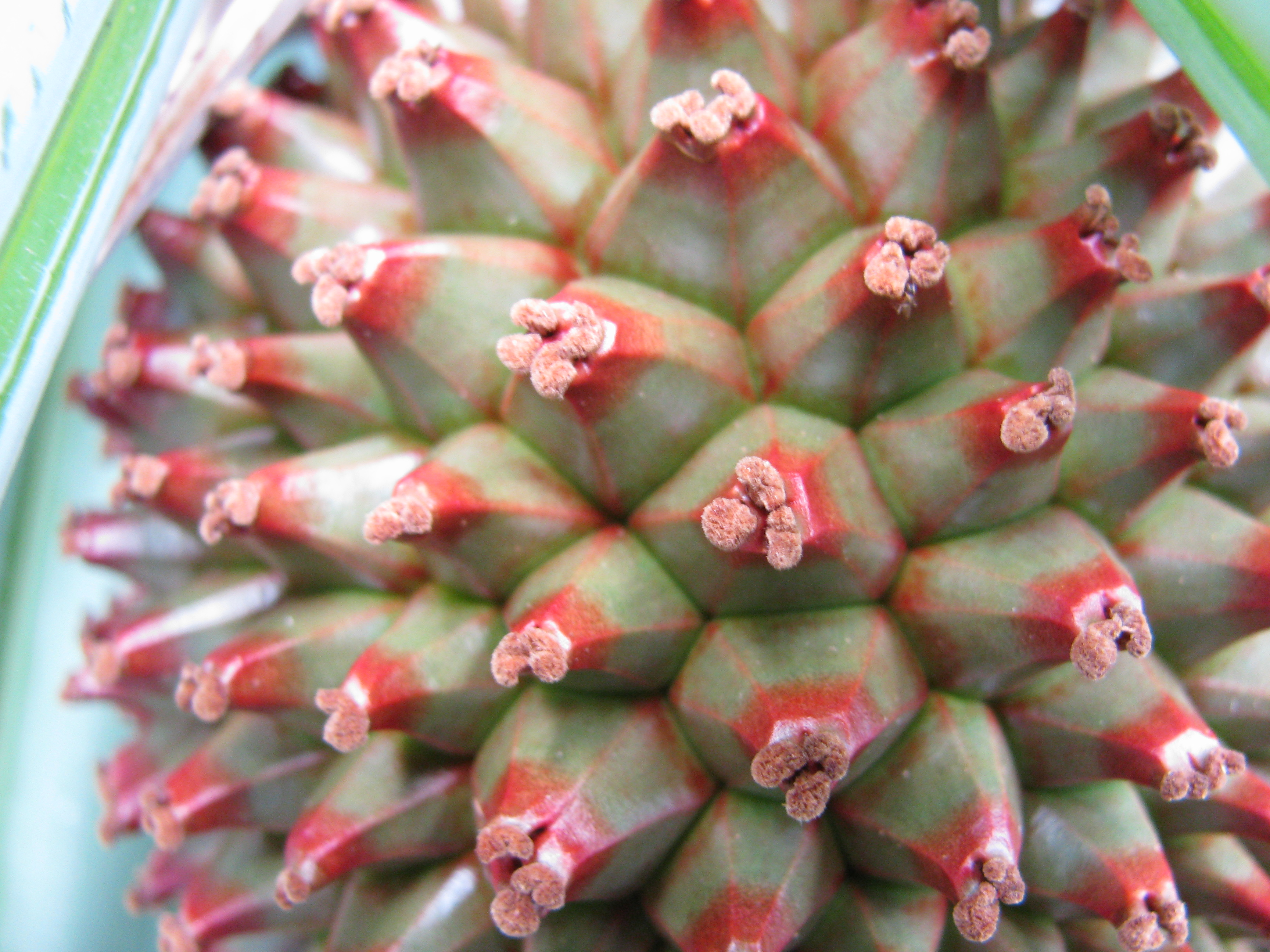 Pandanus vandermeeschii (Pandanus) Fruit at Kahanu Gardens NTBG Kaeleku Hana, Maui, Hawaii. November 04, 2009 #091104-0708 Image Use Policy